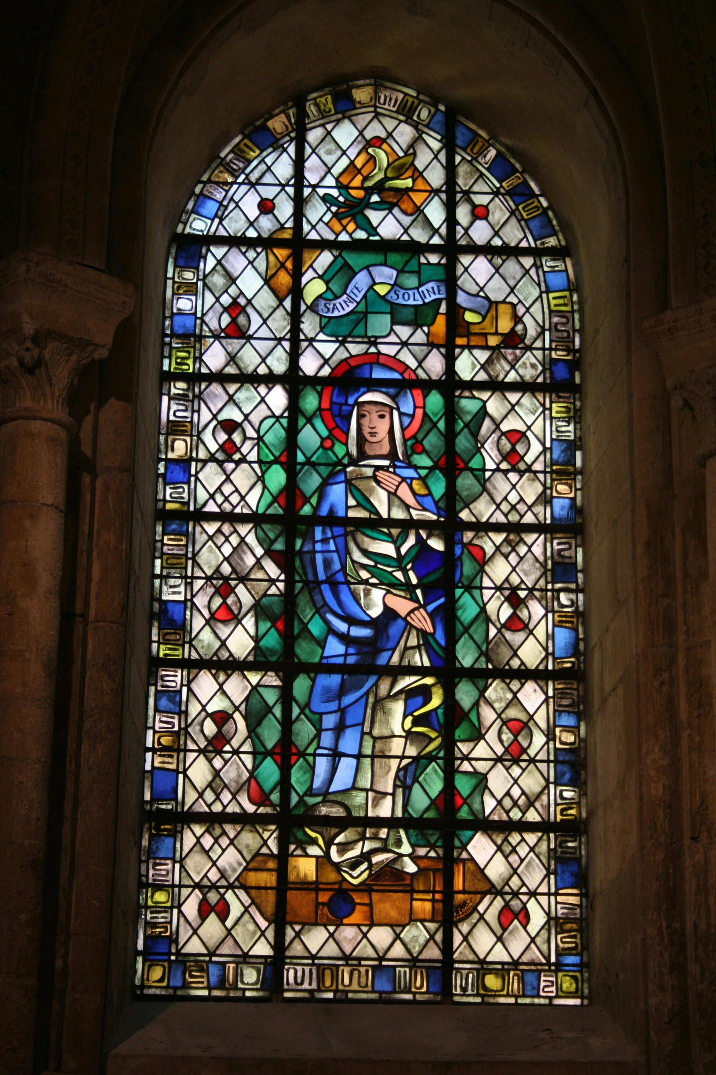 Sainte Soline, église Saint-Pierre, Chartres, Eure-et-Loir (France).